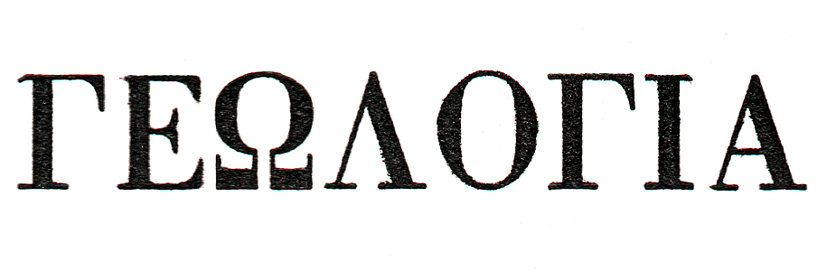 Геология на греческом языке. Фрагмент греческого учебника по геологии